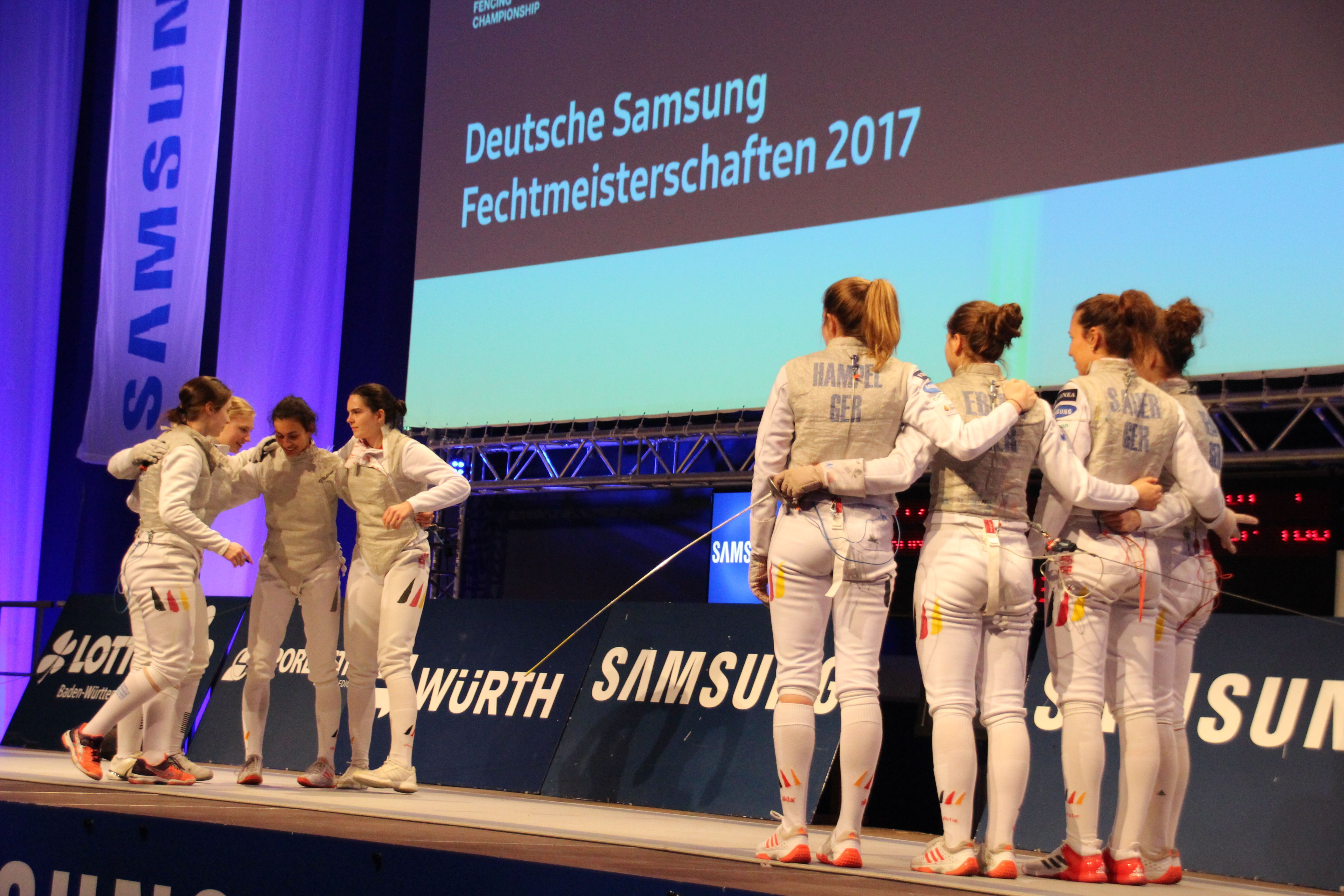 DeuDeutsche Fechtmeisterschaften 2017 im Florett vom 25. bis 26. März 2017 im Olympiastützpunkt Tauberbischofsheim beim Fecht-Club Tauberbischofsheim